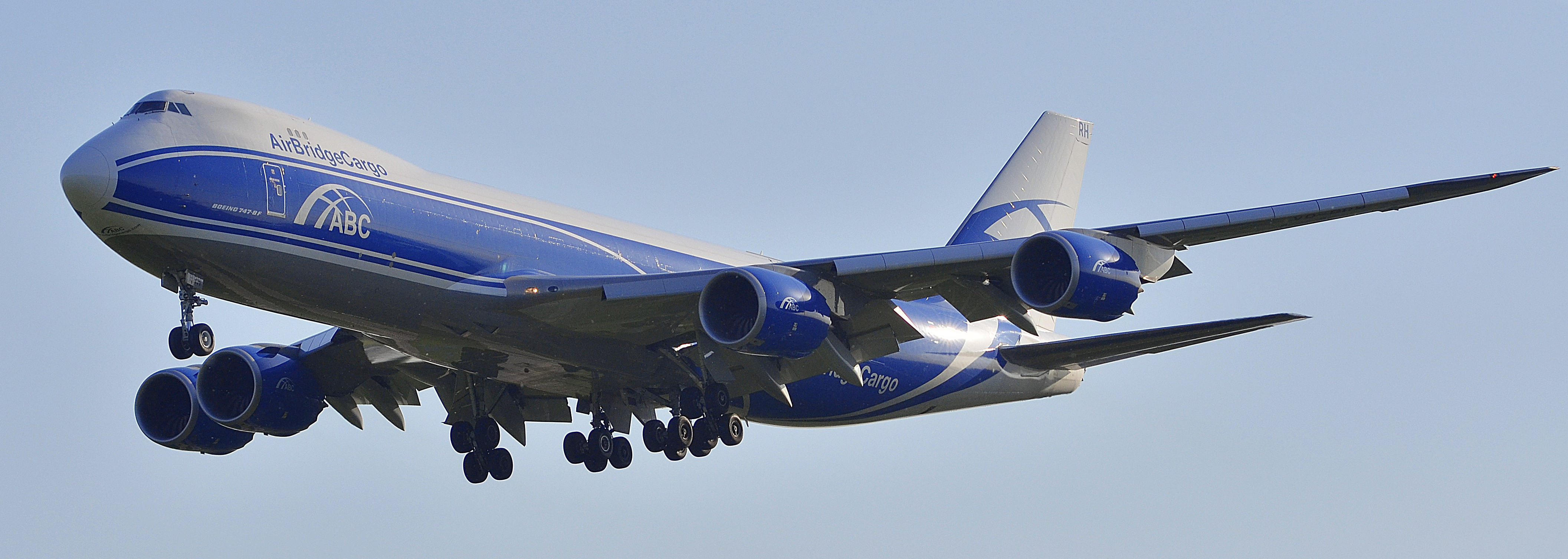 Можно увидеть здесь : You can see here